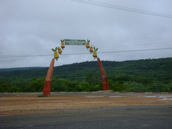 Portal da cidade de Santo Antônio de Lisboa - PI